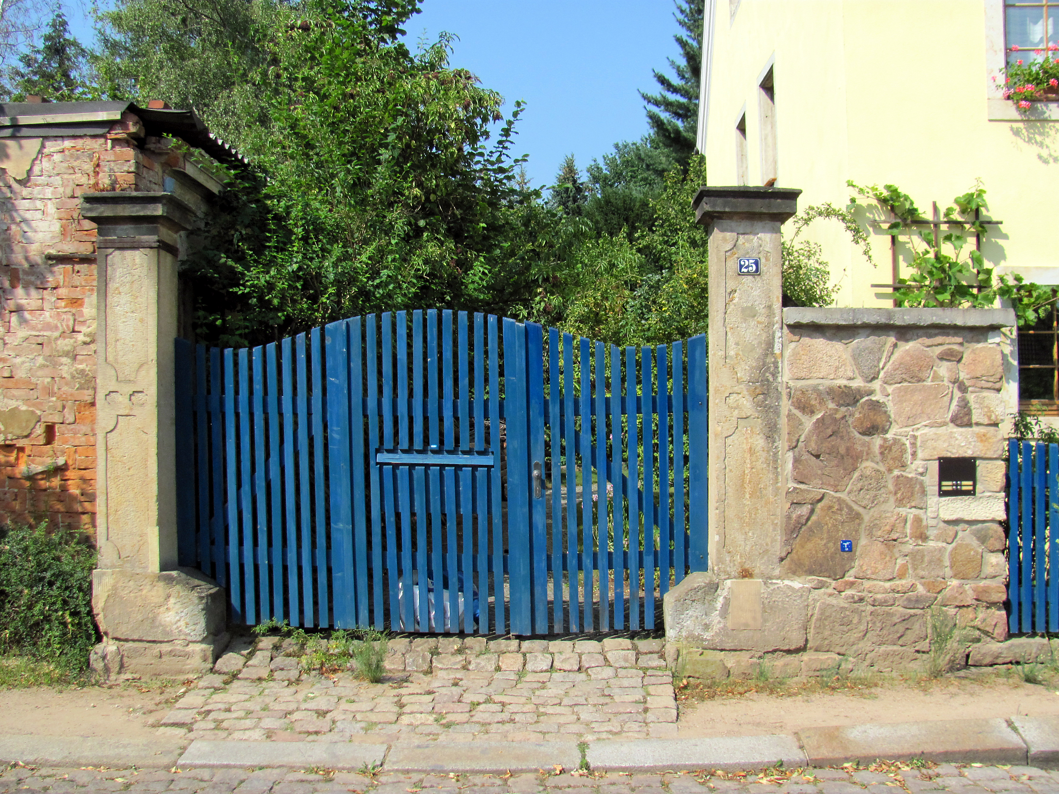 Radebeul-Oberlößnitz, Tor von Haus Eisold